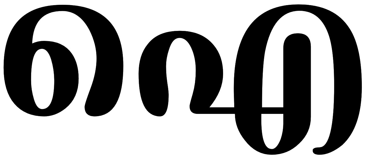 ഐ അക്ഷരം